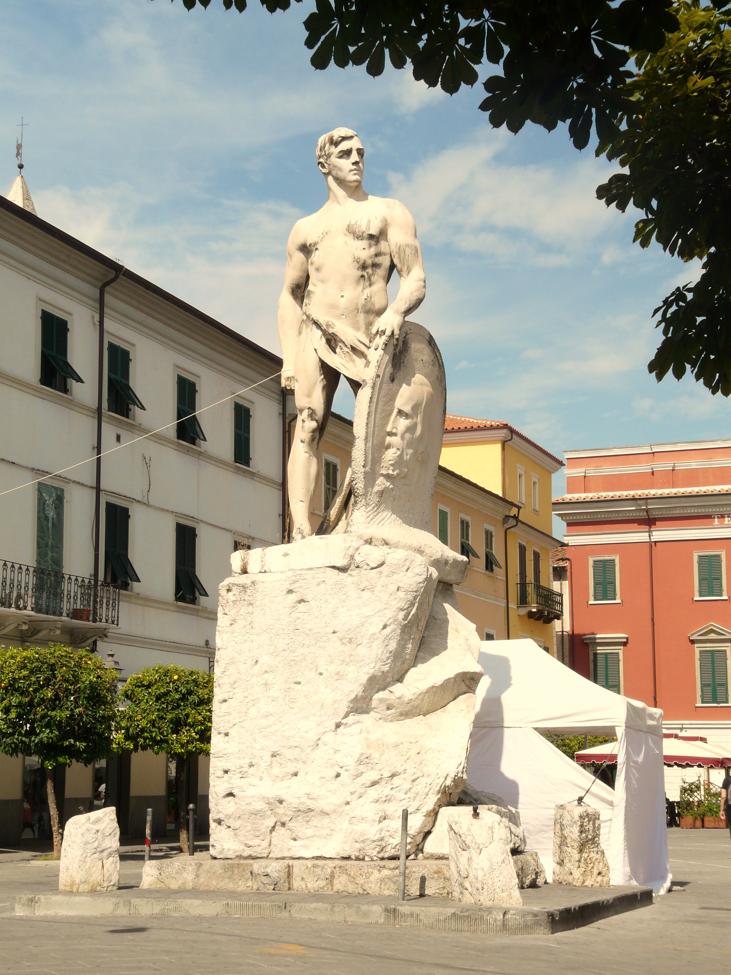 Monumento in piazza Giuseppe Garibaldi, Sarzana, Liguria, Italia